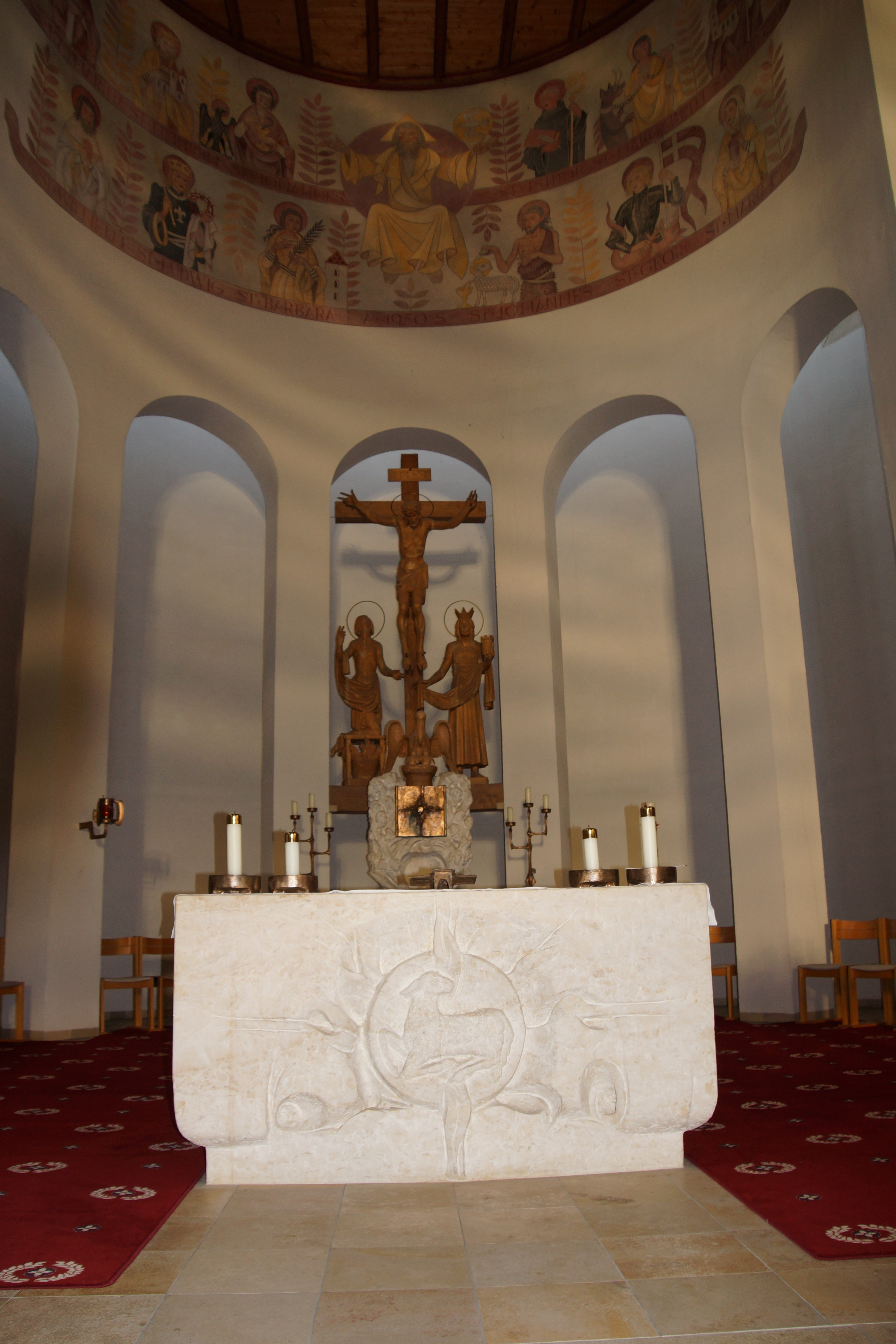 Die Pfarrkirche St. Barbara in Bodenwöhr